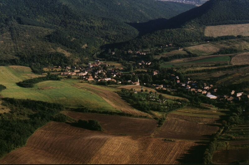 Cserhátszentiván légifelvételen